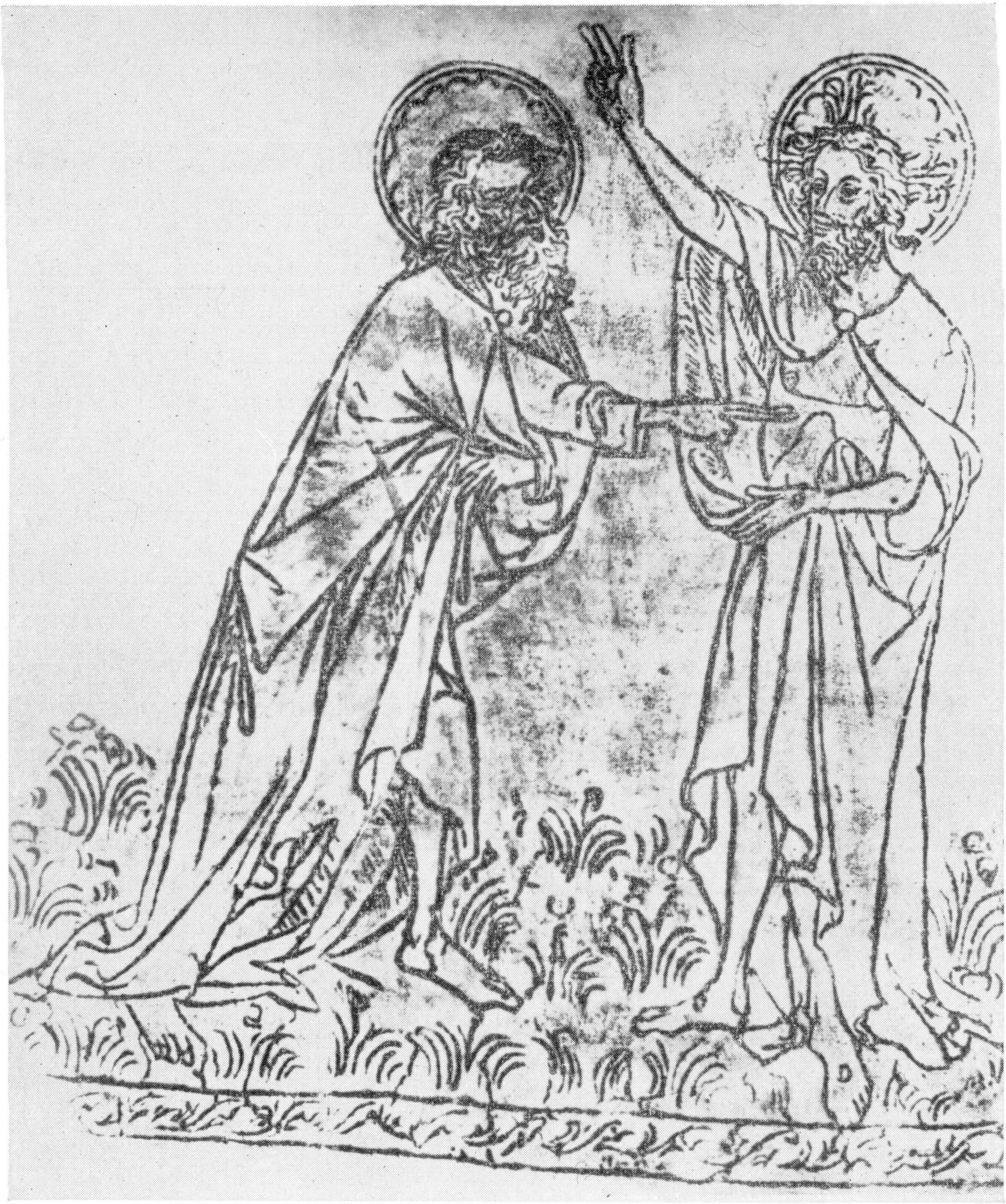 Gotische Ritzzeichnung des Heiligen Thomas an der ältesten Glocke der Thomaskirche von Theoderich Reinhard um 1477